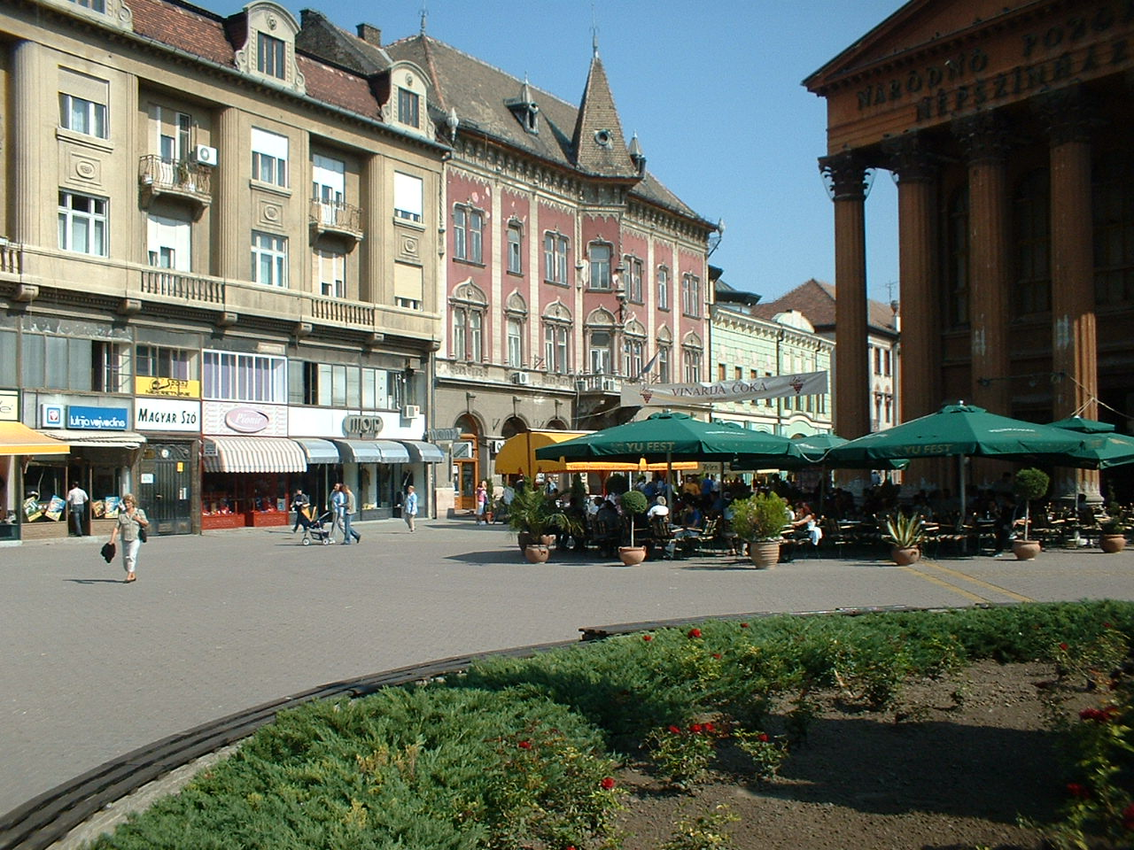 A korzó Szabadkán